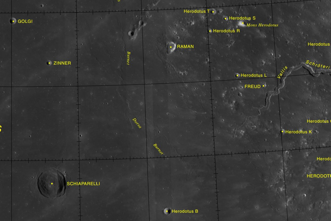 Cráter lunar Freud. Localización. (Imagen LRO)